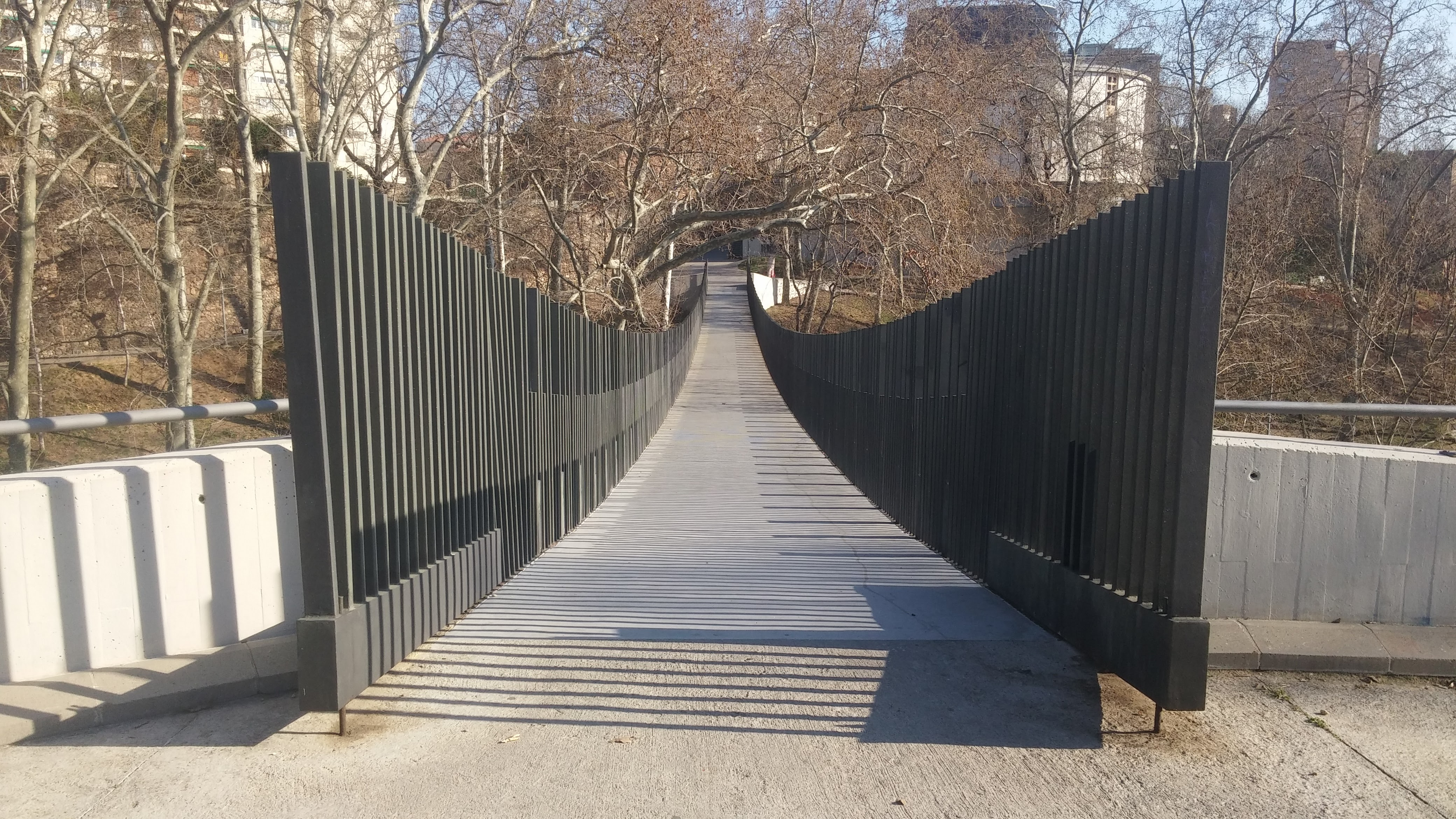 Foto de la pasarela desde el acceso de lado de la Iglesia